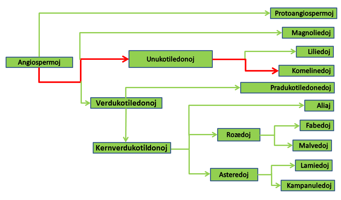 Angiospermoj